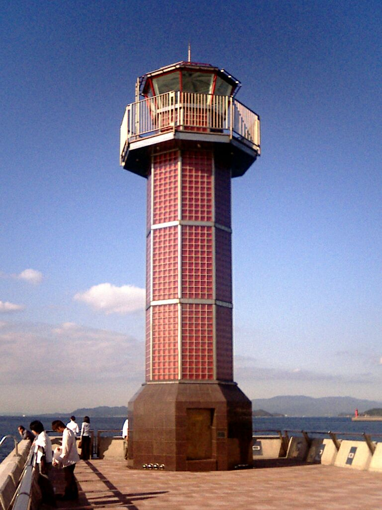 高松港玉藻防波堤灯台 - 日本国香川県高松市（サンポート高松の赤灯台。外壁に赤のガラスパネルを使用しており、灯台全体が輝く。）